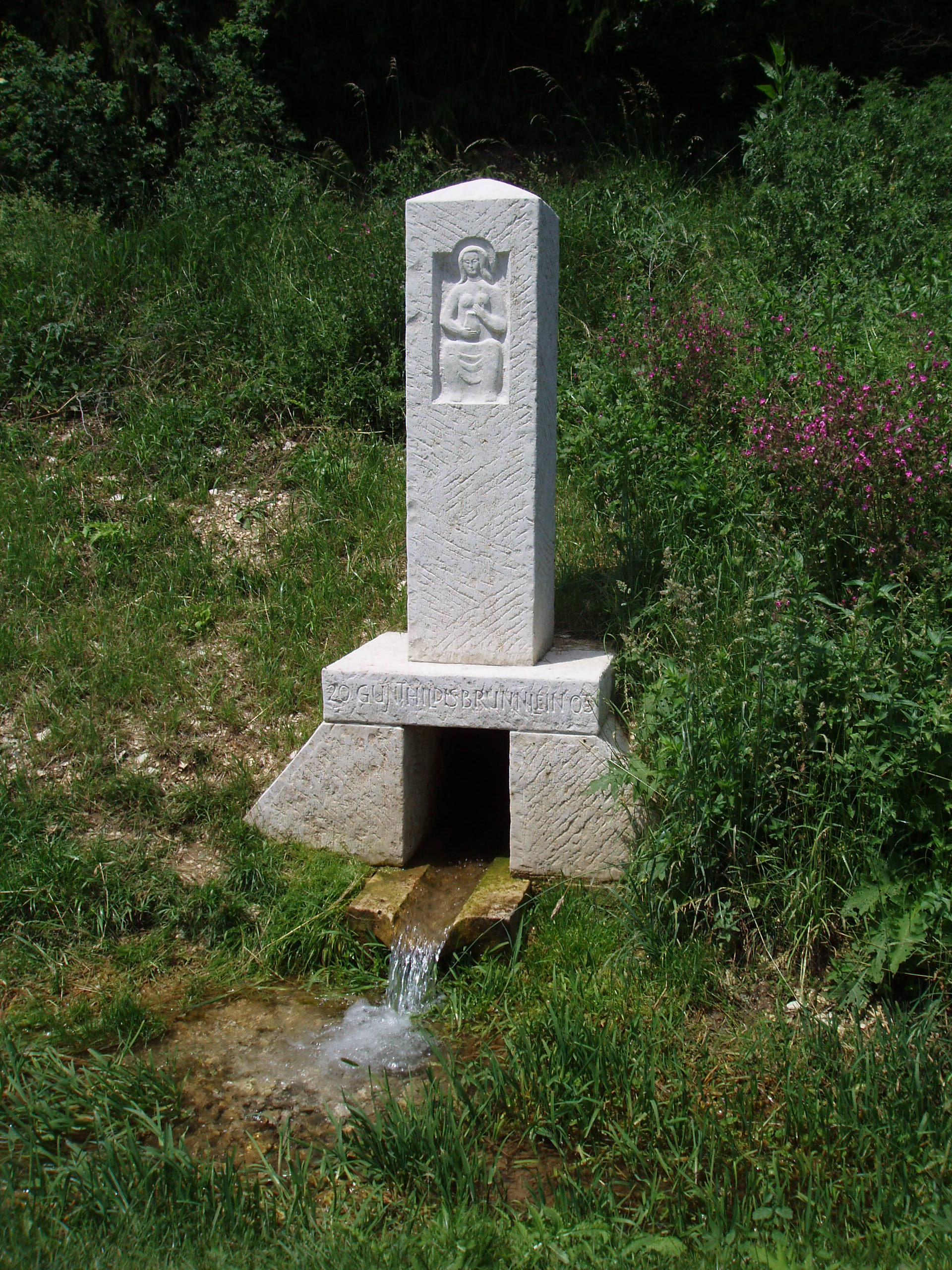 Gunthildis-Quelle im Schambachtal bei Suffersheim, Bayern